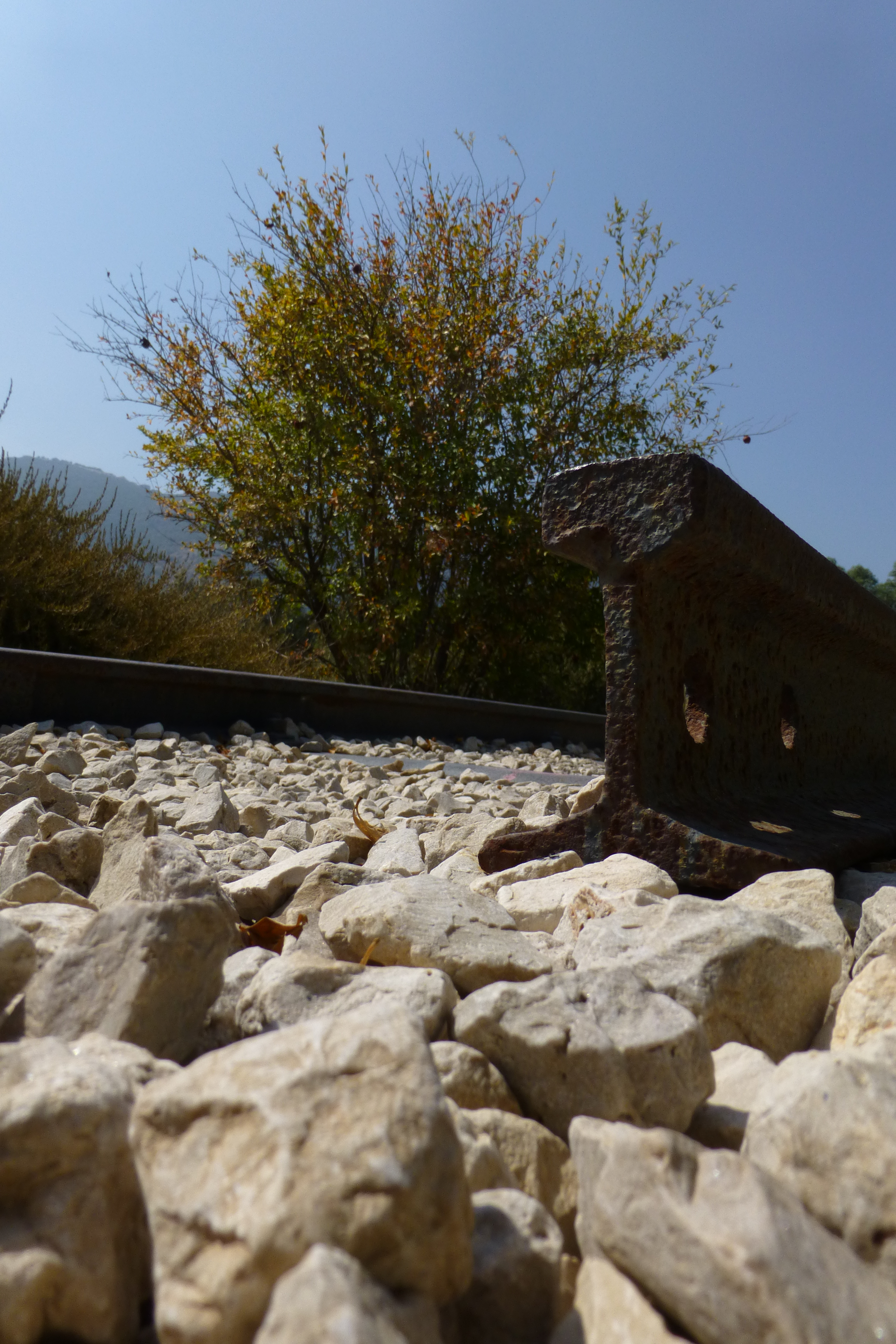 רכבת העמק - מעבירי מים והסוללה - צומת העמקים